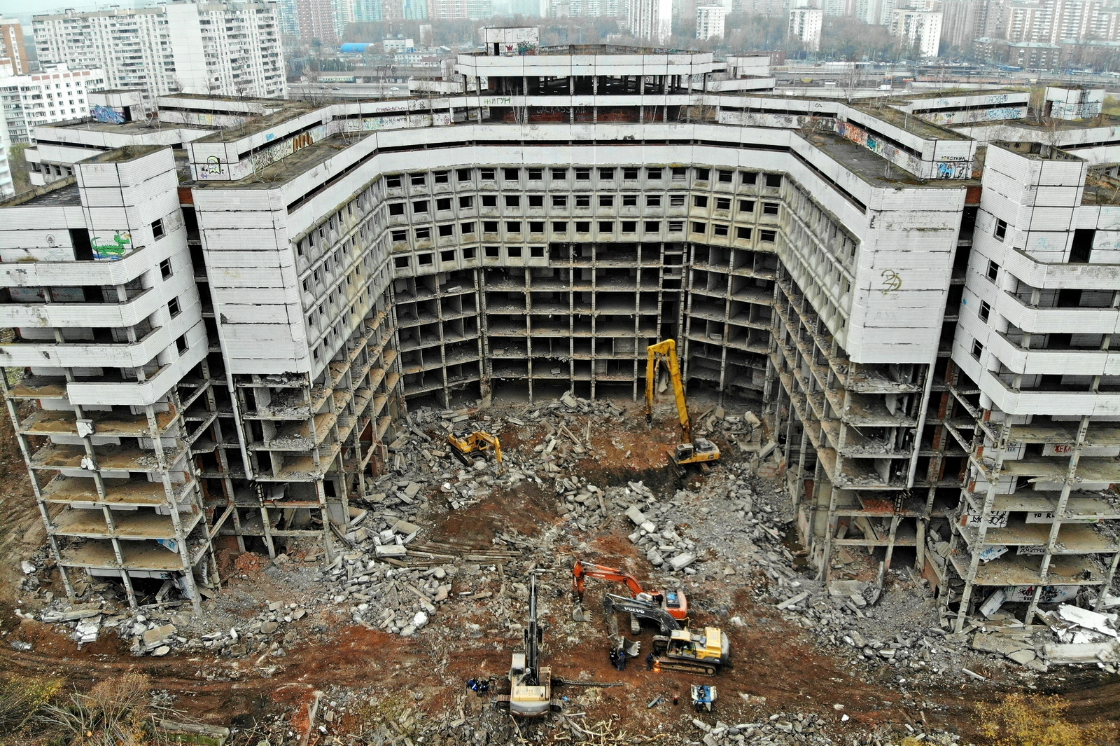 Снос Ховринской больницы